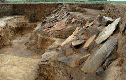 Руины обложенного камнем вала и ров на поселении Каменный Амбар. Фото Александра Сенокосова